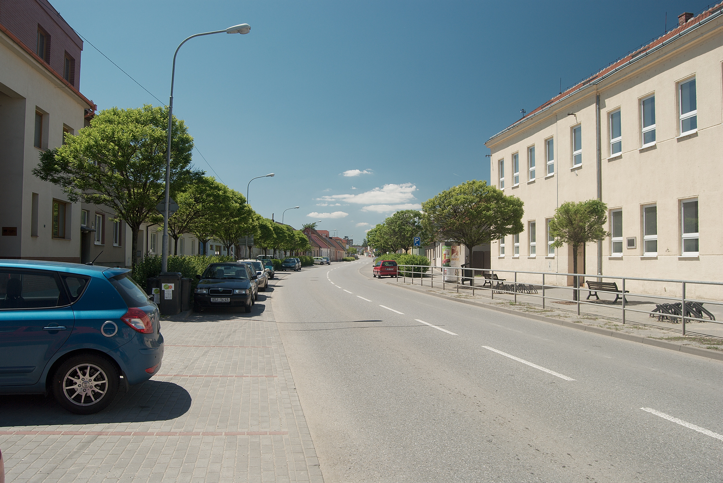 Česky: Brno-Horní Heršpice - Sokolova ulice